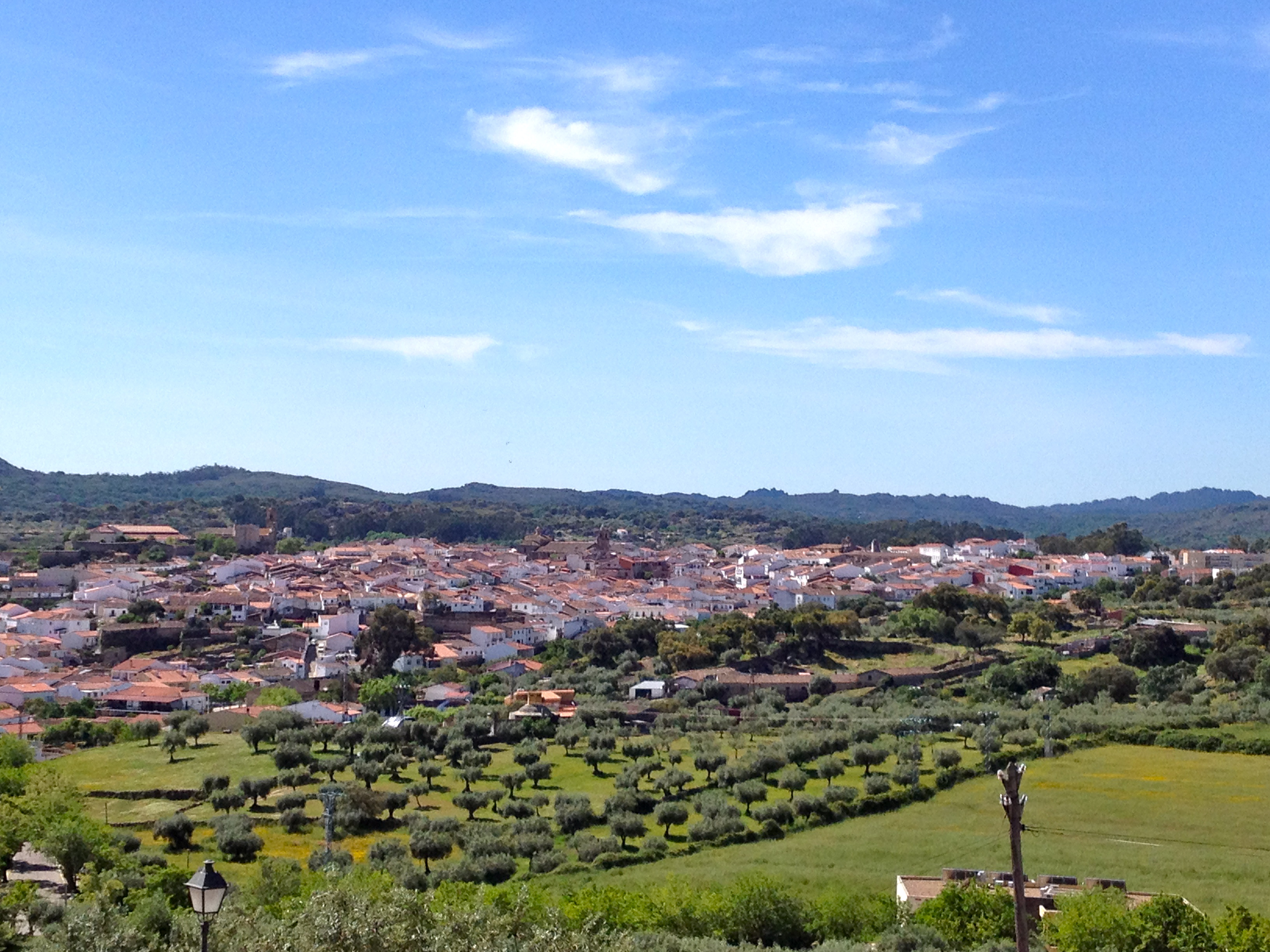 Vista de Valencia de Alcántara desde la ermita de los Remedios